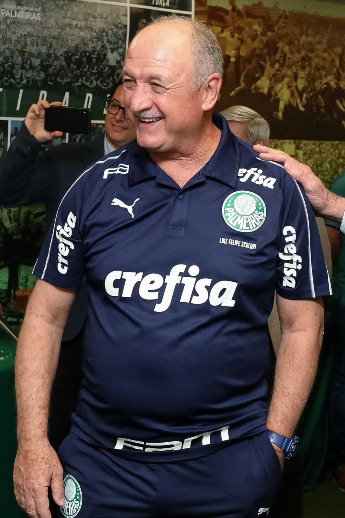 (São Paulo - SP, 27/07/2019) Presidente da República, Jair Bolsonaro, assiste à partida de futebol entre Palmeiras x Vasco da Gama, válida pelo campeonato brasileiro 2019. Foto: Marcos Corrêa/PR